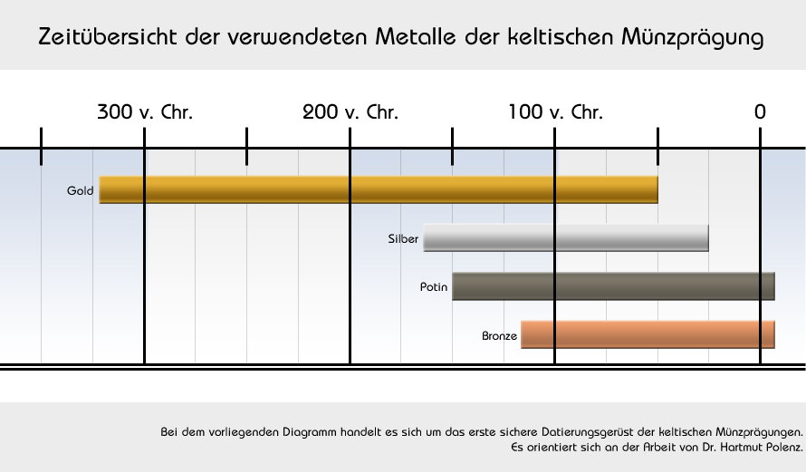 Bei dem vorliegenden Diagramm handelt es sich um das erste sichere Datierungsgerüst der keltischen Münzprägungen. Es orientiert sich an der Arbeit von Dr. Hartmut Polenz.